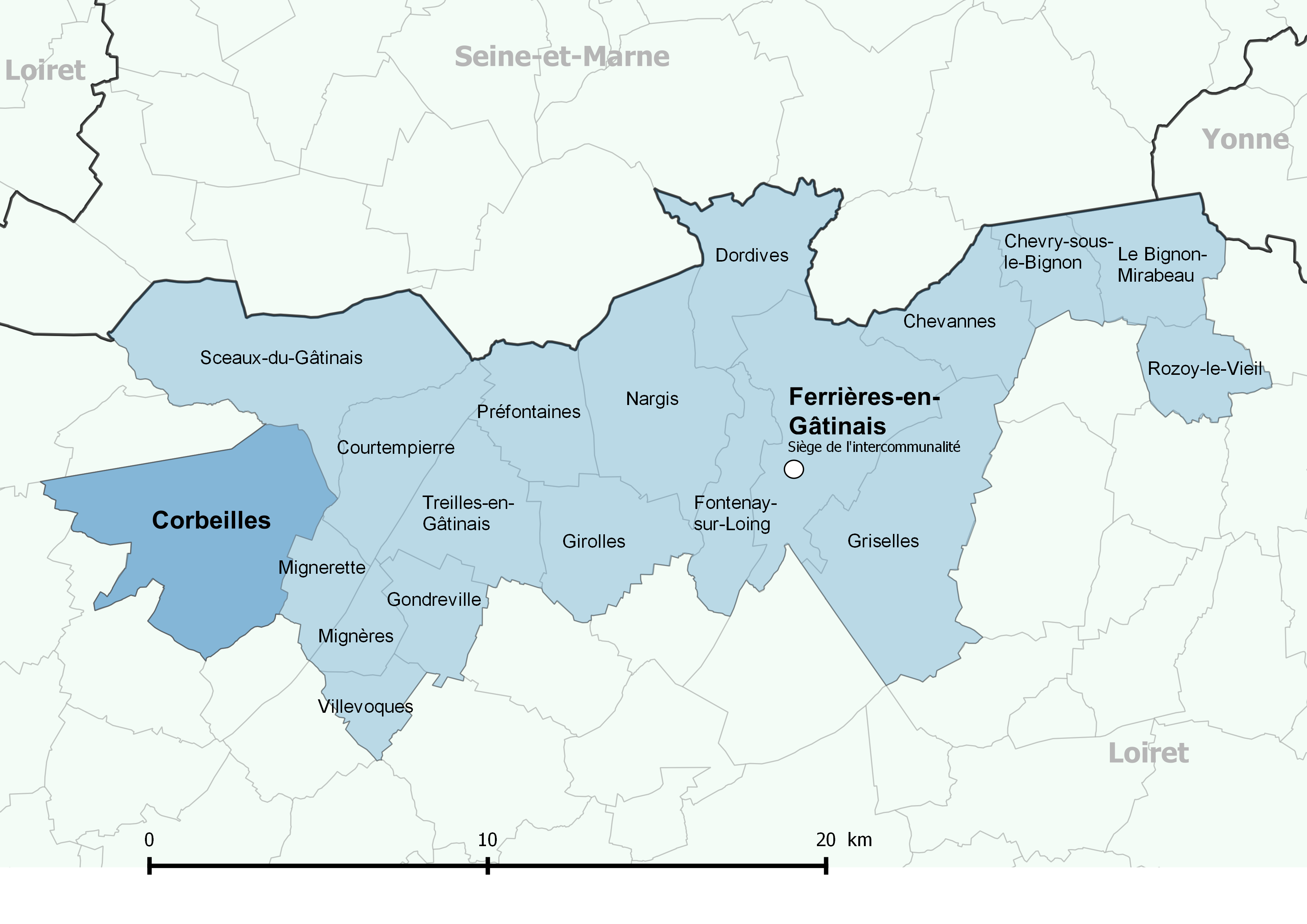 Périmètre de la communauté de communes des Quatre Vallées (Loiret) - Positionnement de la commune de Corbeilles.